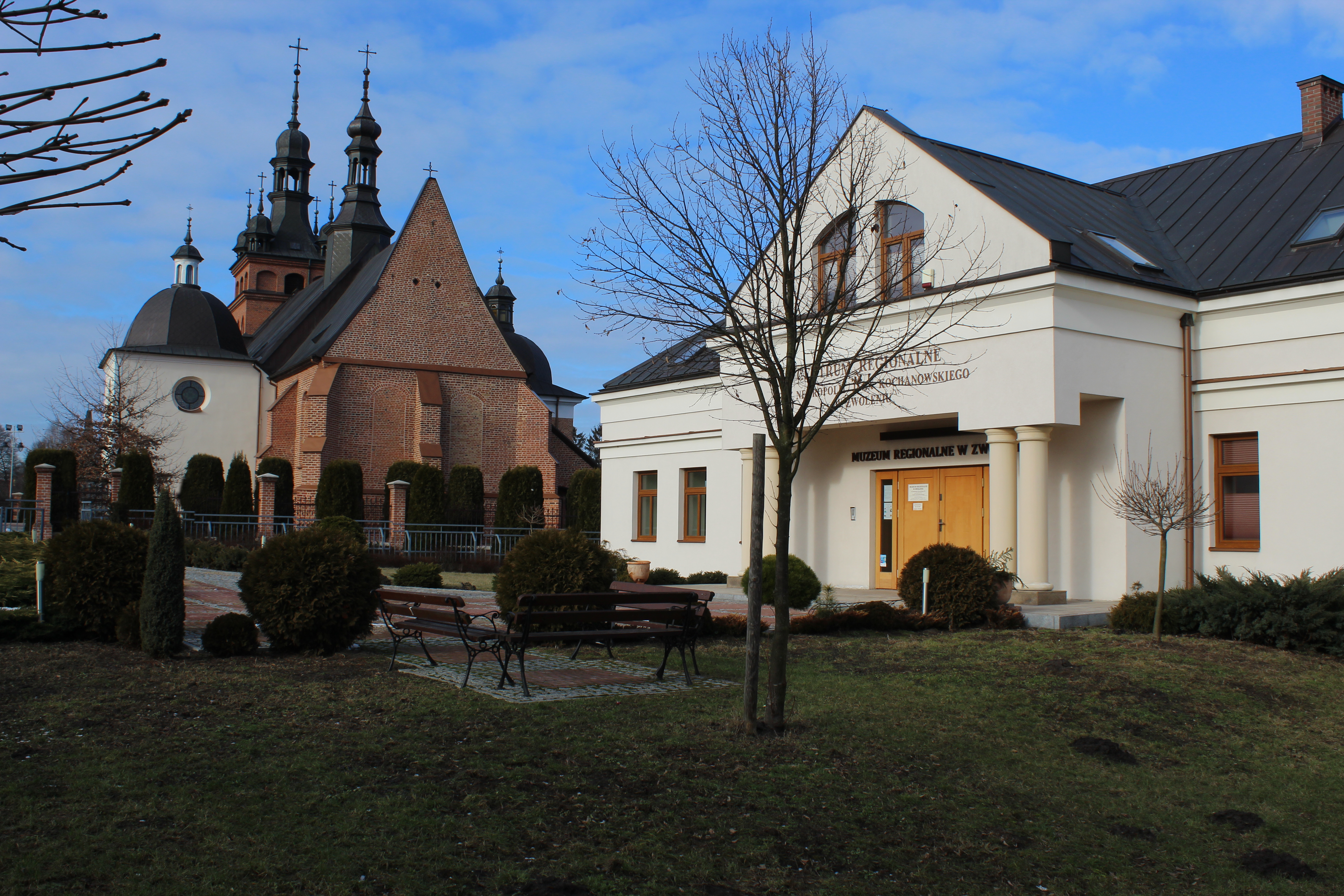 Budynek Muzeum Regionalnego w Zwoleniu